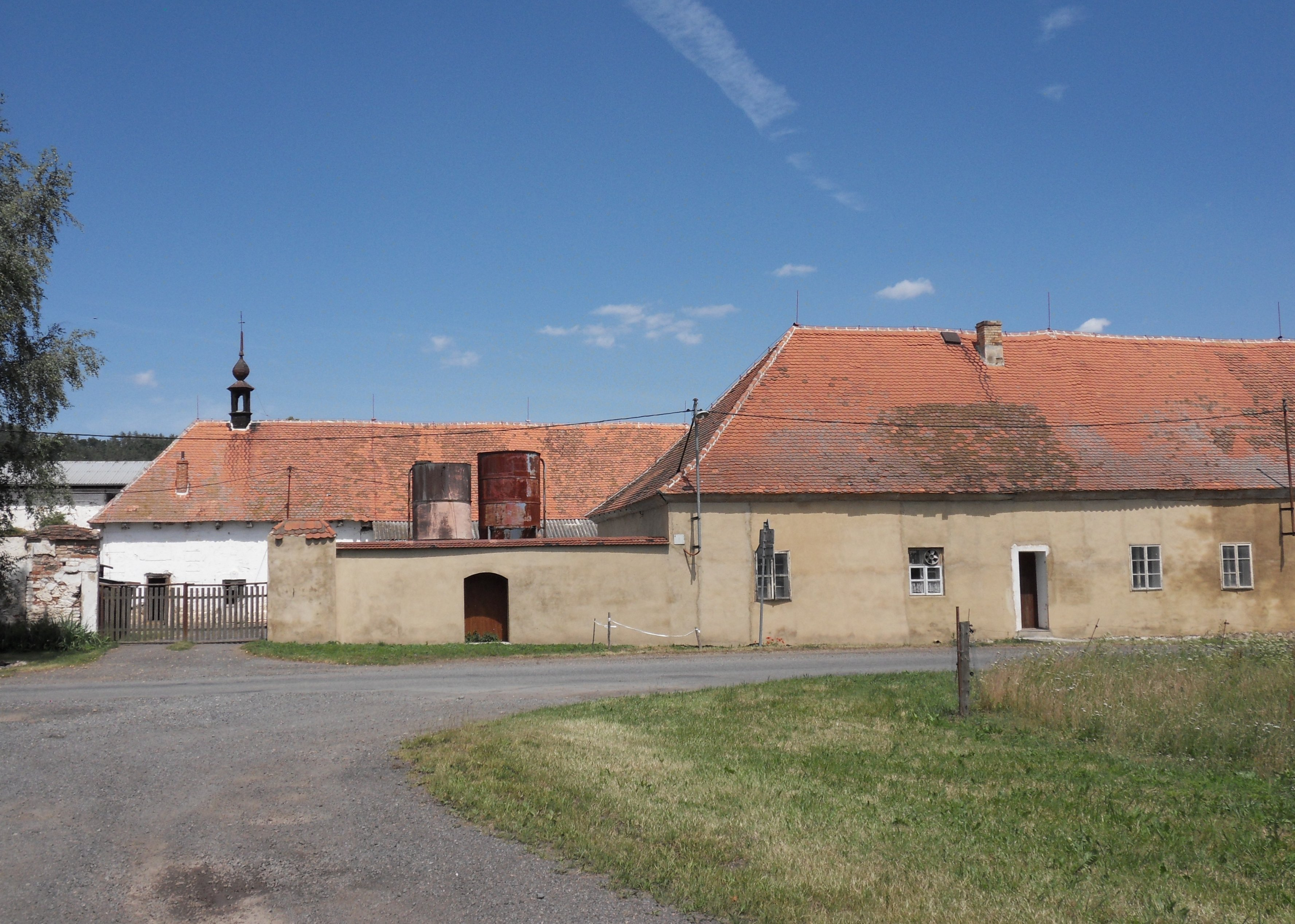 Hospodářský dvůr Lomany u Plas, okres Plzeň-sever